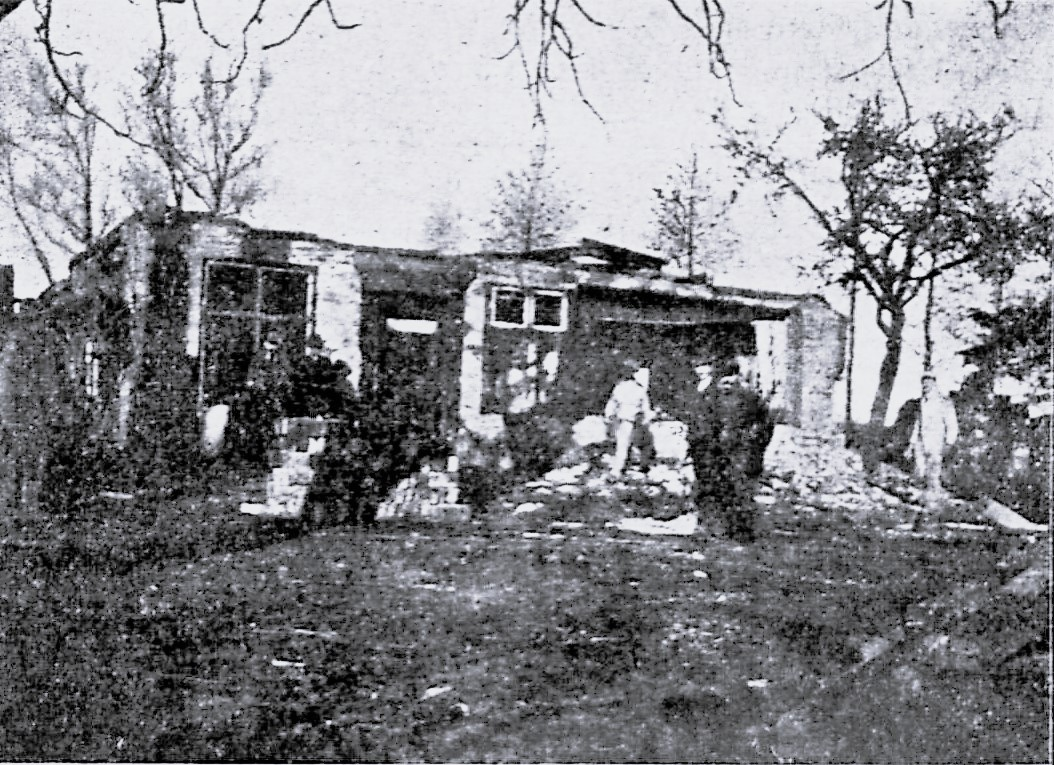 Abbruchstelle des alten Wohnhauses auf dem dritten Fischerbuden zu Lübeck.